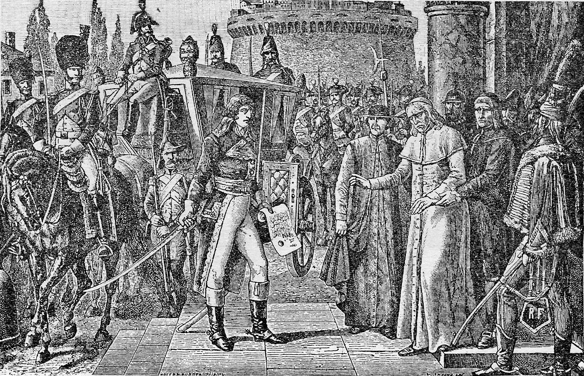 Генерал Луи-Александр Бертье берет в плен папу Пия VI